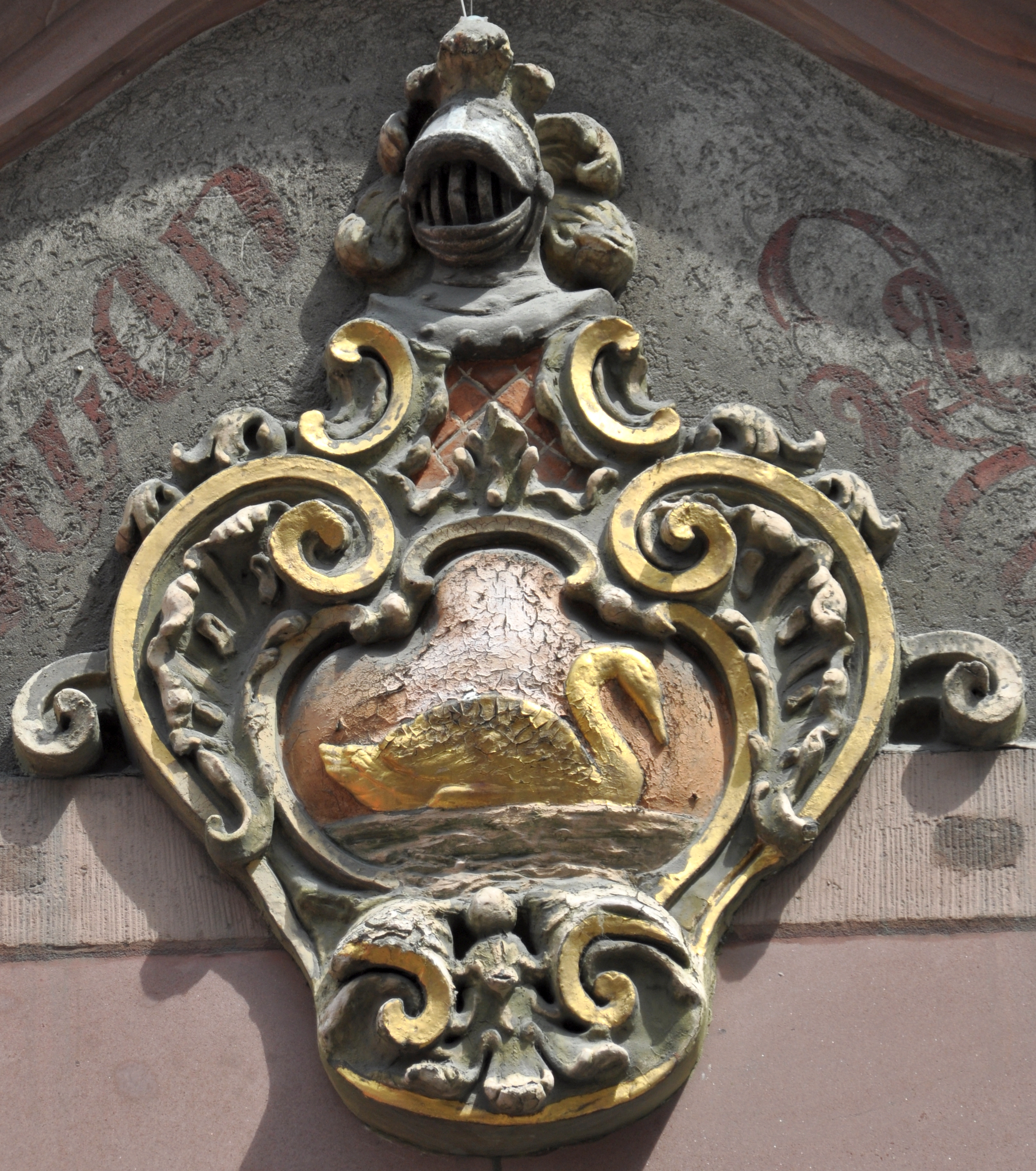 Große Friedberger Straße 32 in Frankfurt am Main. Hauszeichen "Zum Schwan" über der Einfahrt.